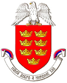 Coat of arms of Kraljevo, one of the more imortant cities in Serbia/Blason de la ville de Kraljevo, l'une des villes les plus importantes de Serbie